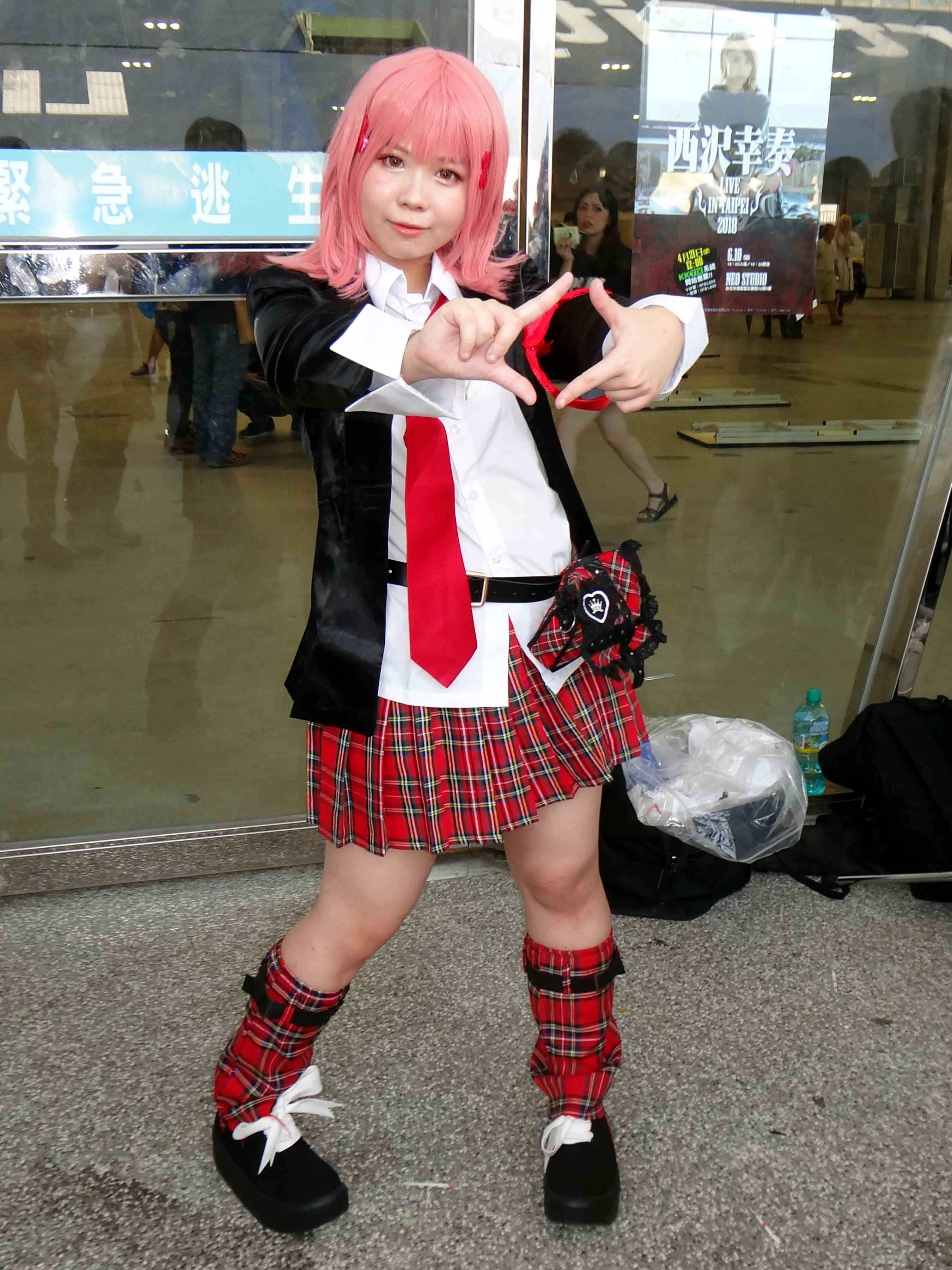 第28屆亞洲動漫創作展，《守護甜心》日奈森亞夢cosplayer。